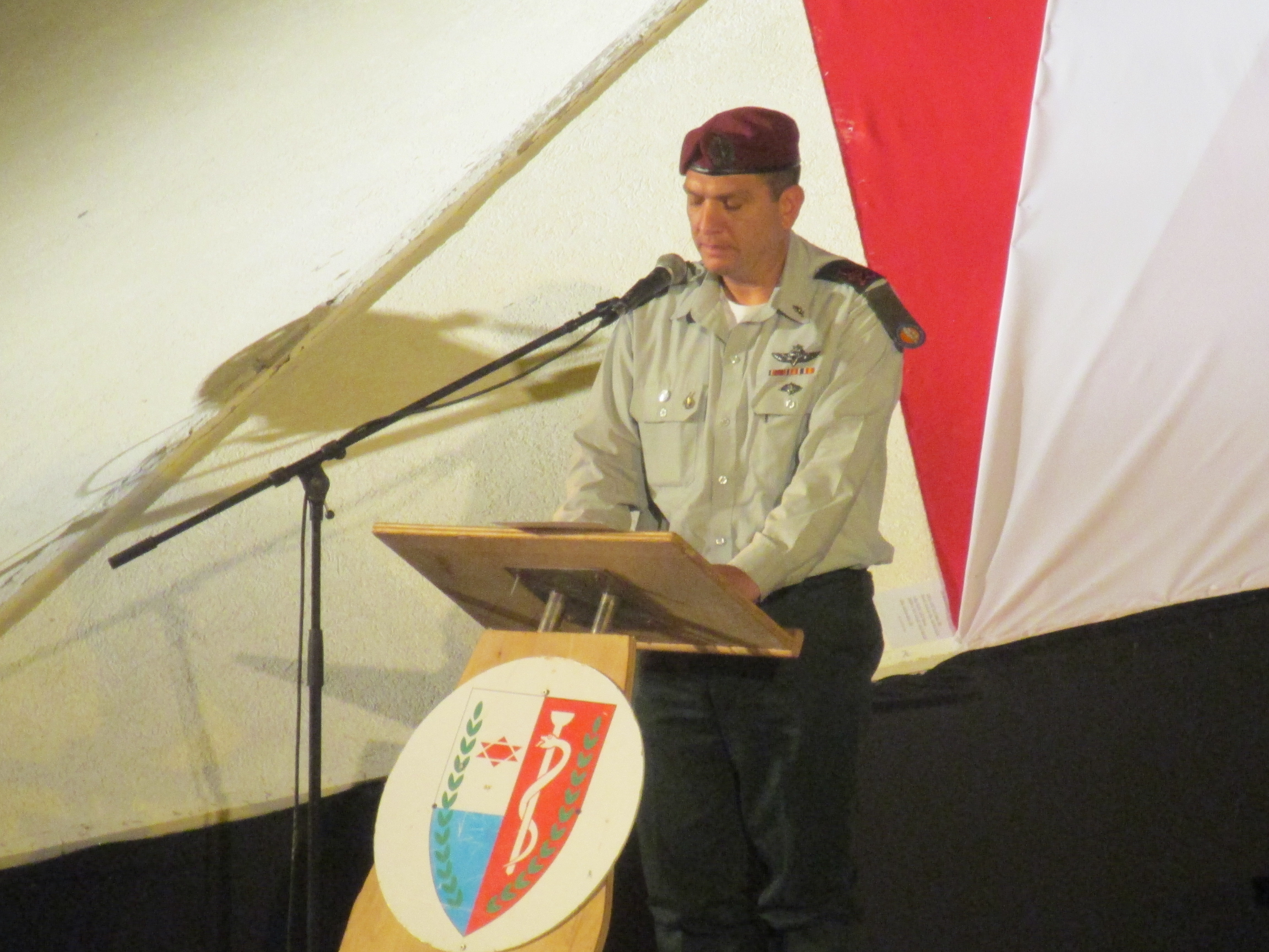 אלוף אהרון חליוה בטקס זיכרון לחללי חיל הרפואה בחיפה